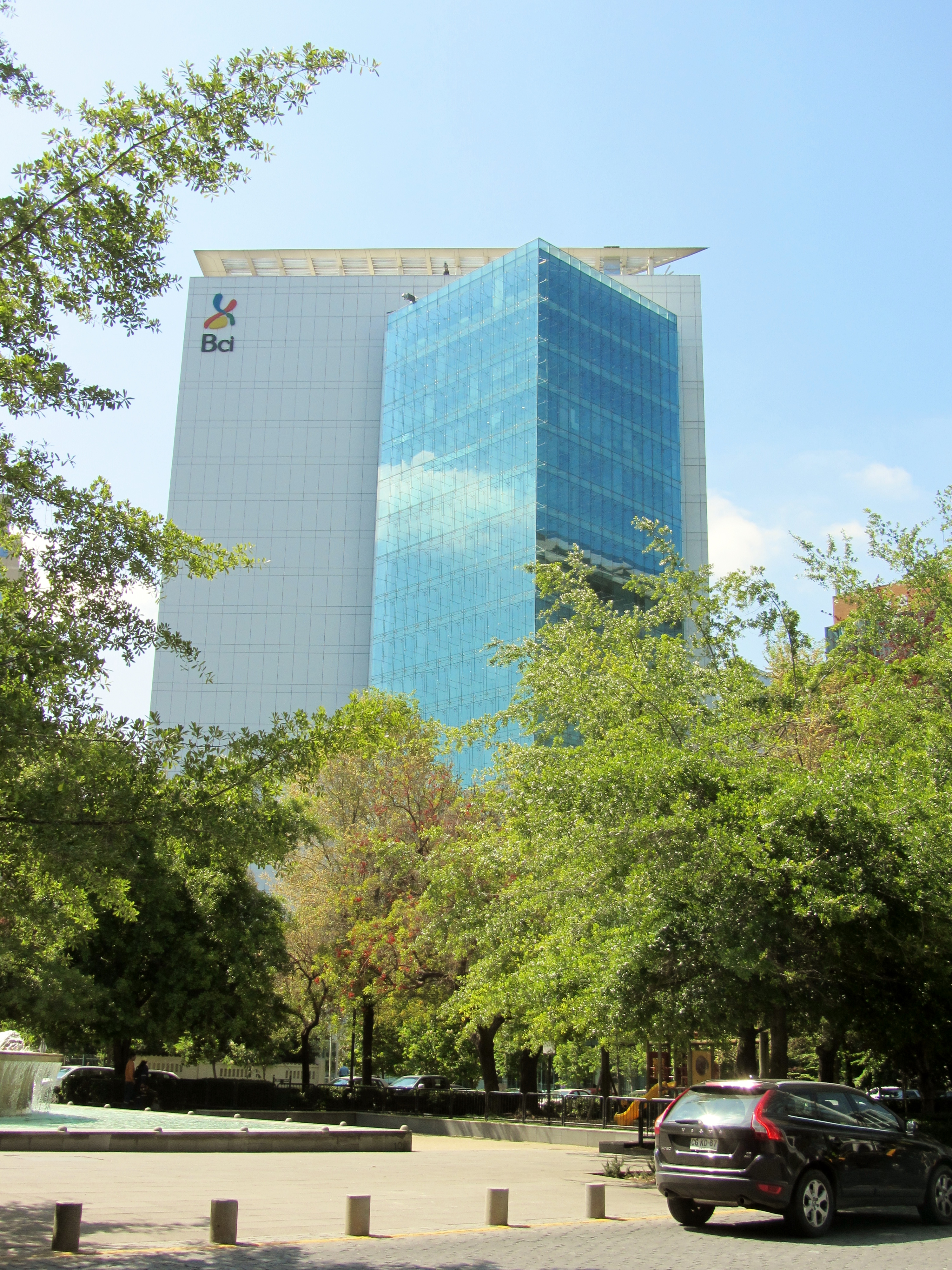 Edificio corporativo del Banco de Crédito e Inversiones (BCI), El Golf 125, obra de Borja Huidobro y la oficina A4 (arquitectos Sebastián di Girolamo, Germán Zegers y Cristián Valdivieso) en la esquina norte del acceso sur a la calle Nuestra Señora de los Ángeles, corta vía que forma una medialuna y vuelve a salir a la avda El Golf un poco más al norte. En el primer plano, la calzada poniente, empedrada, de la avda El Golf, y parte de la Plaza Loreto. La foto está tomada desde la esquina de Isidora Goyenechea.